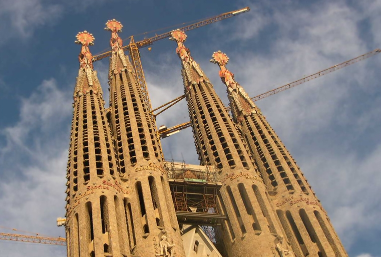 Sagrada Familia, Barcelona - Spain 2003